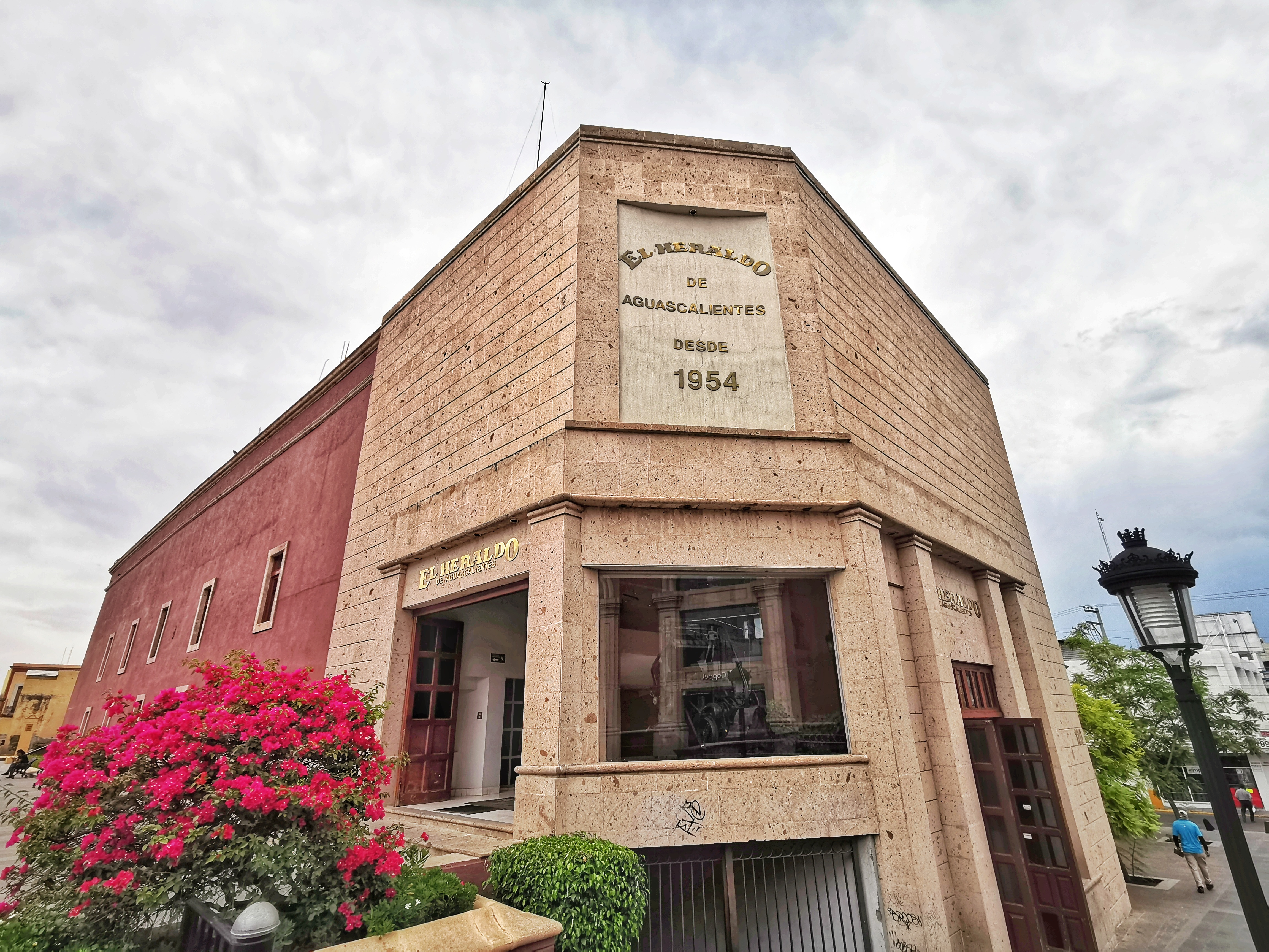 Oficinas del periódico más importante de Aguascalientes